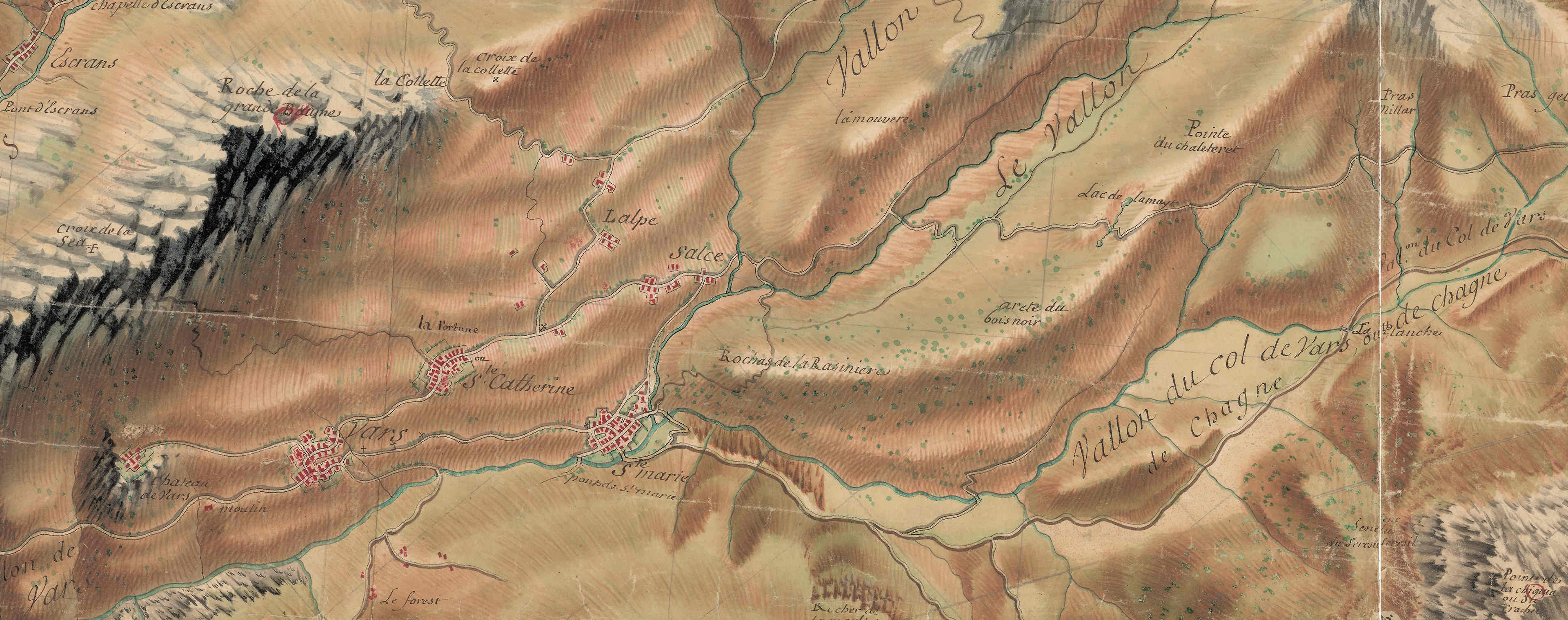 carte de Bourcet numérisé Paris, Nicolas-Alexandre et Olivier-Joseph, Extrait réduc JPG 30% Antoine-H